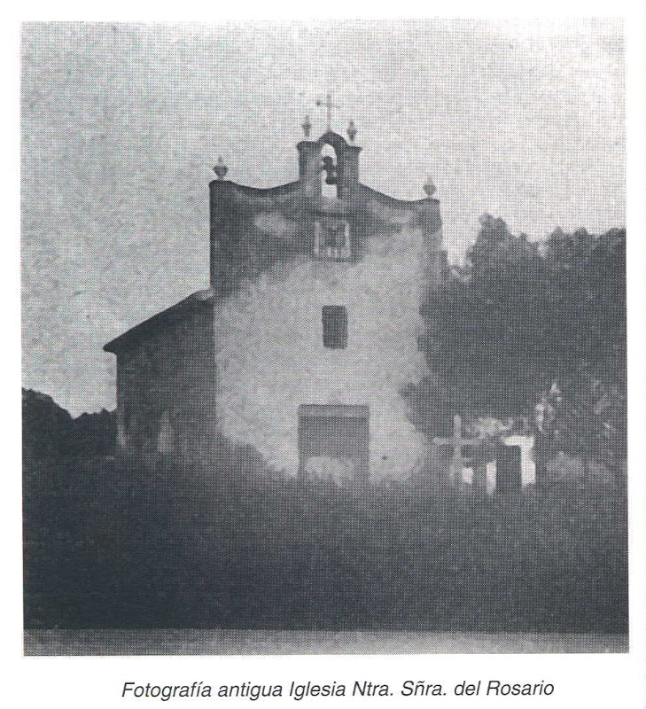 Primitiva Iglesia del Rosario del Cañamelar